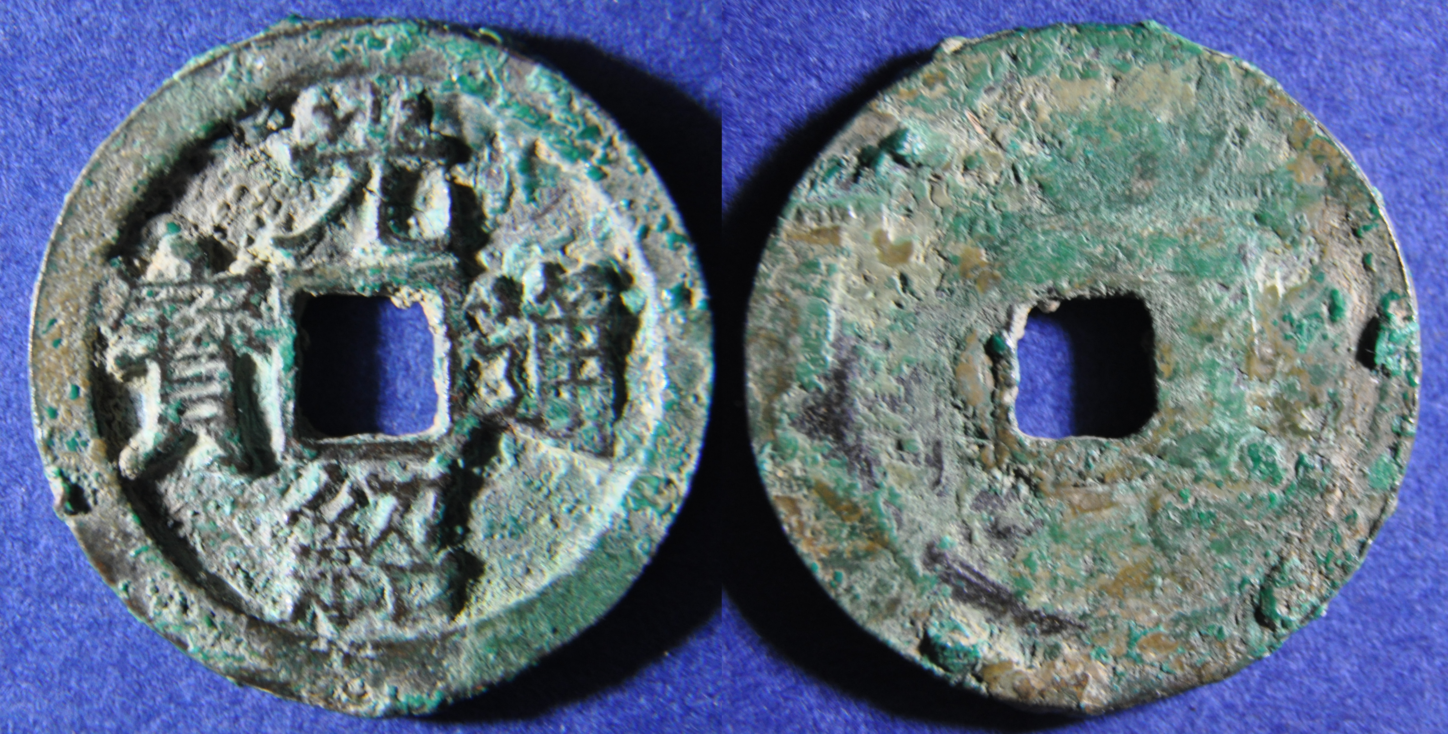 Une monnaie en bronze d’une sapèque du roi Chieu Tong (1516-1524), ère Quang Thieu, neuvième roi de la dynastie Le (1428-1785). A/ Quang Thieu thong bao (Monnaie courante de l’ère Quang Thieu) R/ vide Diamètre : 24,8-25.4 mm Poids : 4,3 g Remarque : Le Y (1506-1524) arrive au pouvoir après l’assassinat de son prédécesseur, Le Duc Tuong, dont il était le neveu, en 1516 par Trinh Duy San. Pendant cette période, il y a une lutte de pouvoirs entre les familles Mac, Nguyen, Trinh et Le. En 1522, Le Chieu Tong s’enfuit de la capitale vers le sud dans la province de Thanh Hoa avec les familles Trinh et Nguyen. Le général Mac Dang Dung place sur le trône Le Cung Hoang, frère de Le Chieu Tong. En 1524, Mac Dang Dung le capture ainsi que les chefs des familles Trinh et Nguyen et les exécutent. Indice de rareté : Rare Référence : Toda 62